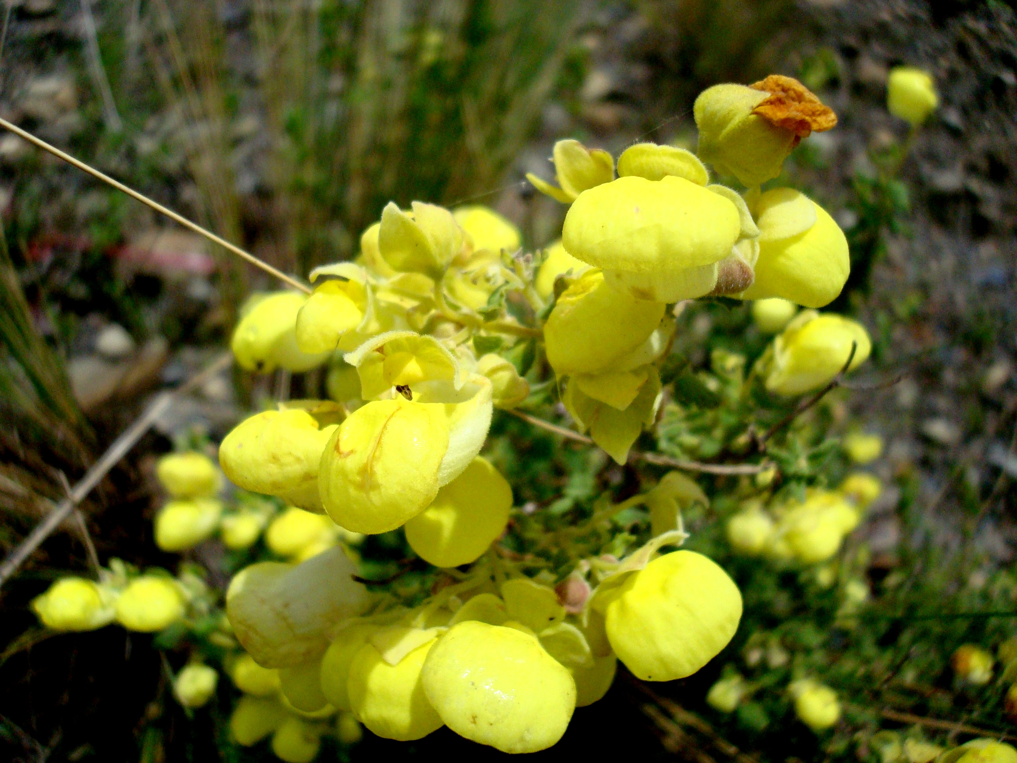 Flores de Calceolaria buchtieniana, amay zapato.